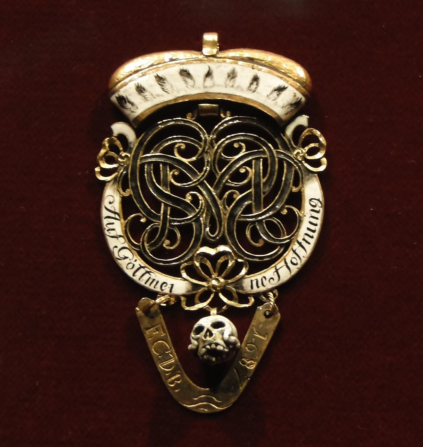 Schmuck aus der Sophienkirche in Dresden, Grabbeilage / Grabbeigabe